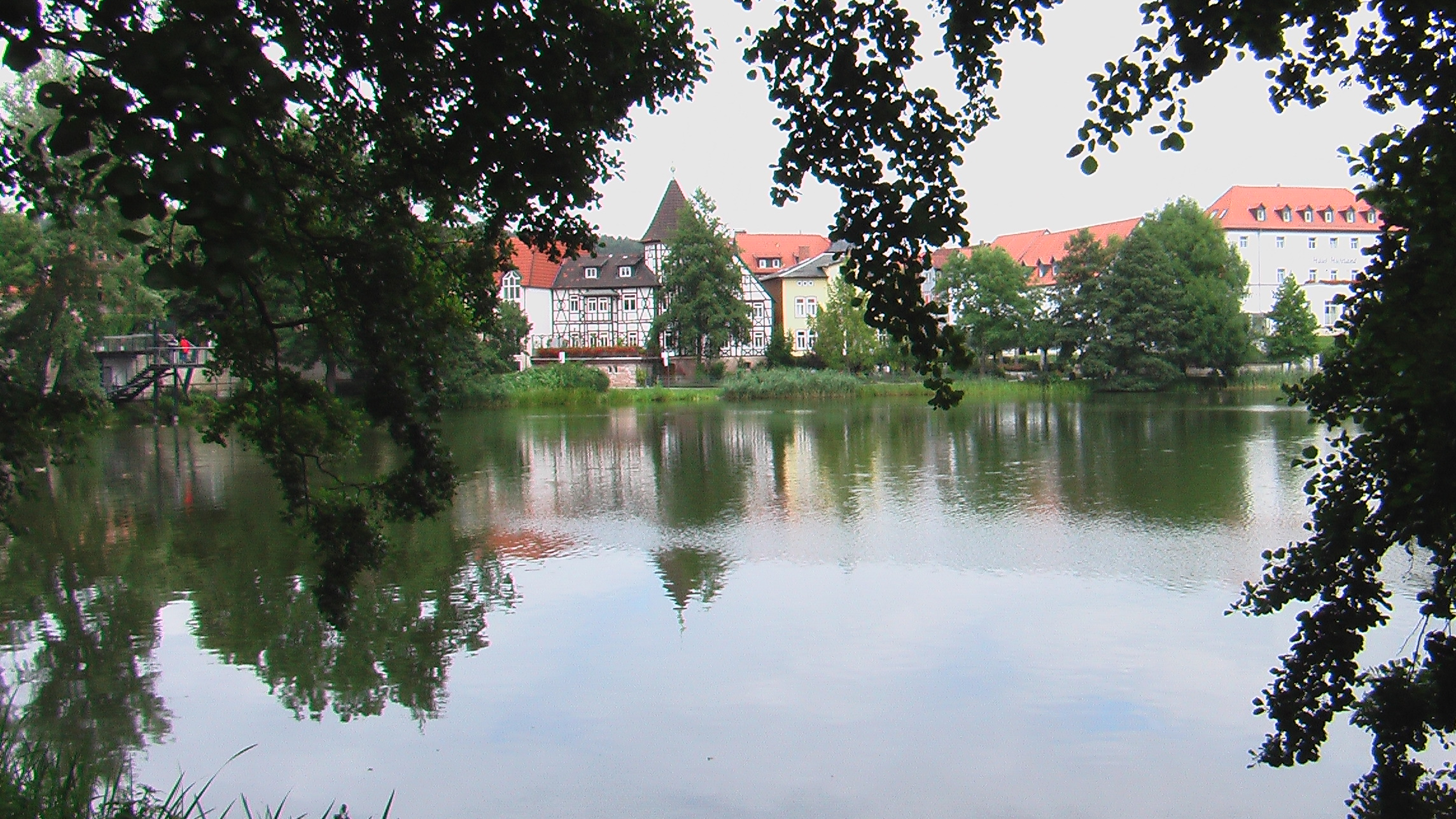 Burgsee in Bad Salzungen